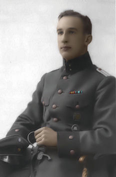 Harry Gustafsson-Guster